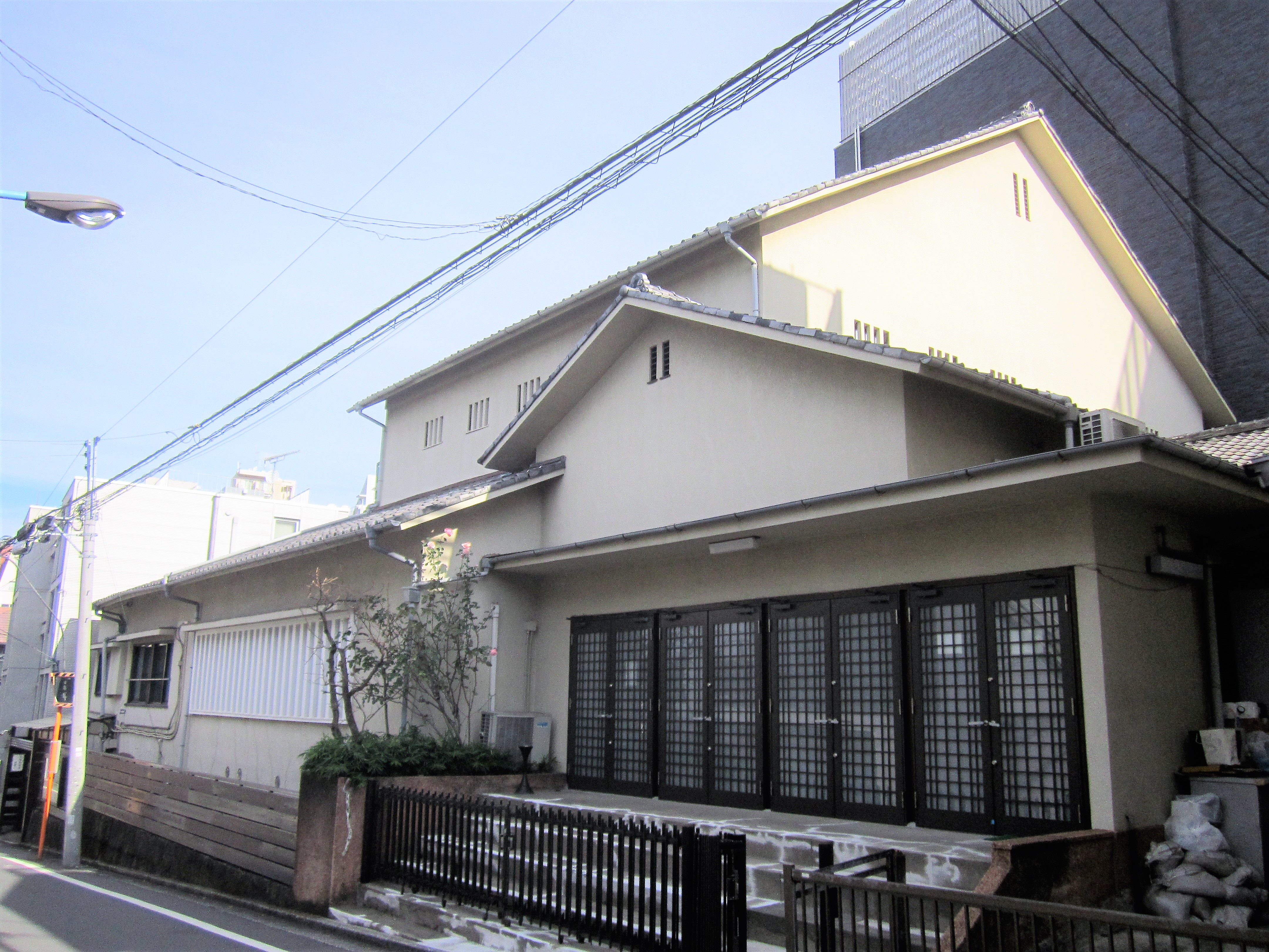 矢来能楽堂